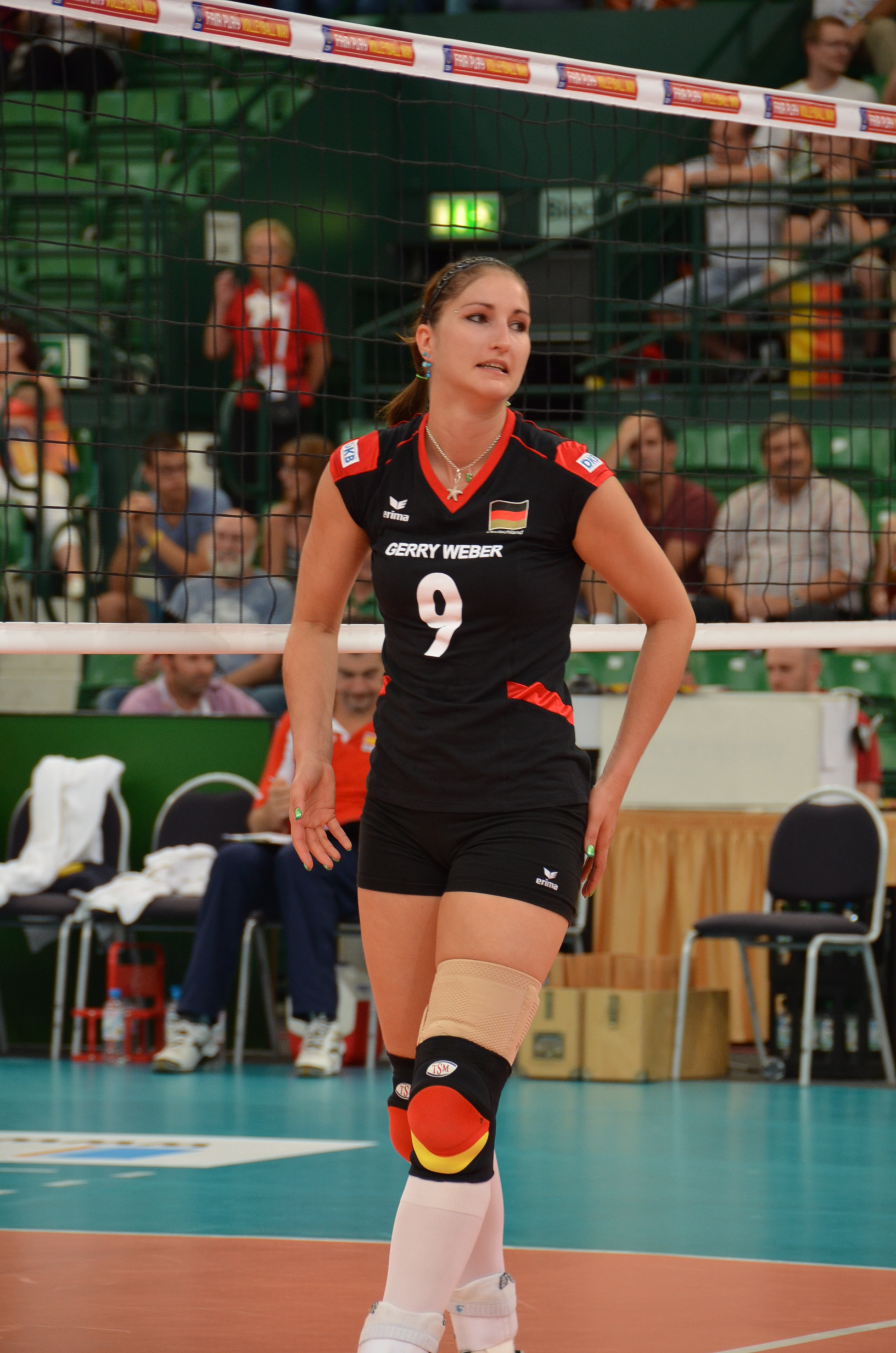 Volleyball-Europameisterschaft der Frauen 2013-Spielort Halle (Westf) Gerry-Weber-Stadion - Spiel 6. September 2013 (Deutschland-Spanien)